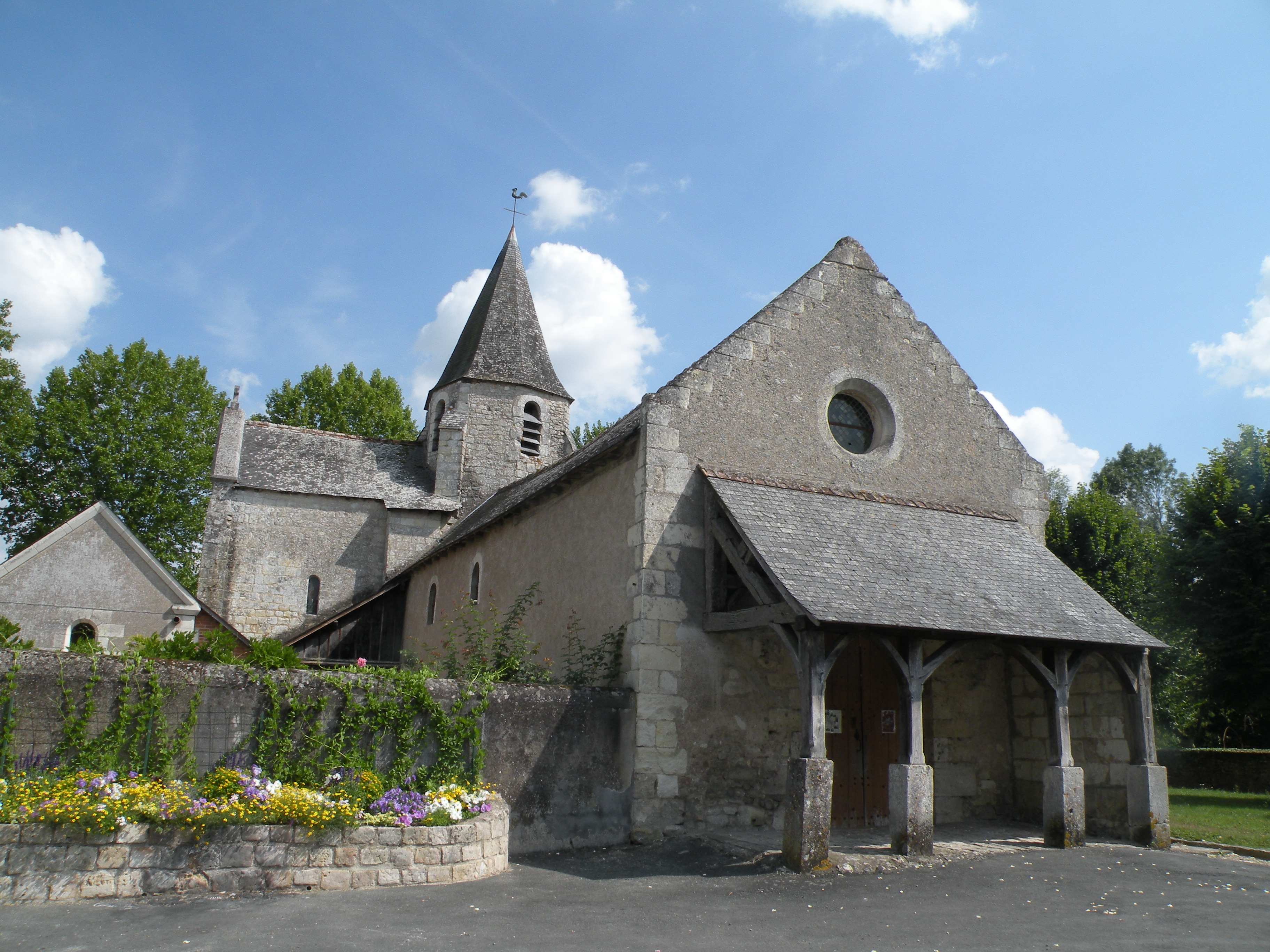 Église Saint-Quentin de La Croix-en-Touraine.